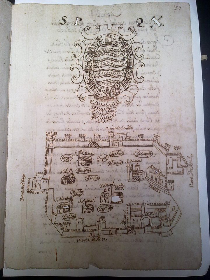 Croquis Intramuros de Jerez de la Frontera (Ángelo Dávila). Subido al grupo Facebook "Cosas jerezanas que se han perdido con el tiempo" por Antonio Mariscal Trujillo. Original disponible en el Archivo Histórico Municipal de Jerez